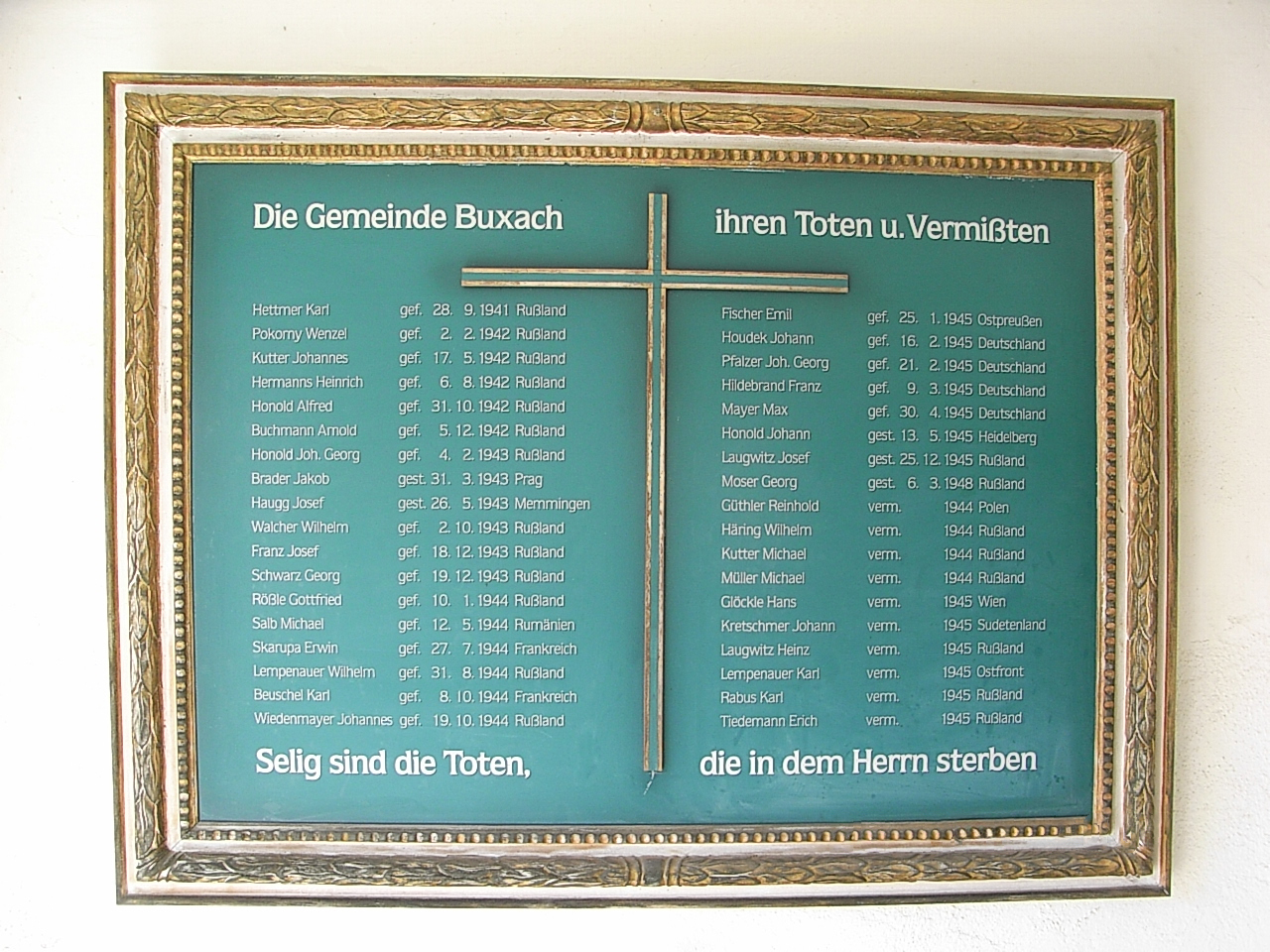 Erinnerungstafel über die Opfer des zweiten Welltkrieges des Dorfes Buxach-Hart im Eingangsbereich der Dreieinigkeitskirche Buxach